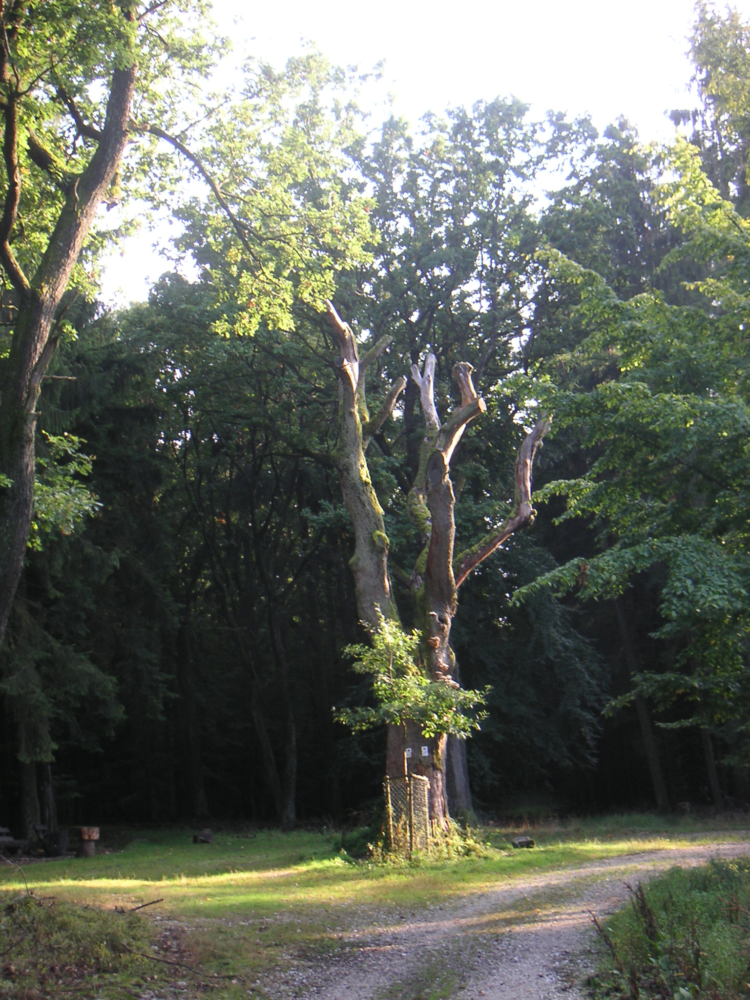 „Batzenbaum“, alte Eiche und Naturdenkmal. Im Wald von Friedrichsdorf, Richtung Gickelsburg und Saalburg; Hessen.